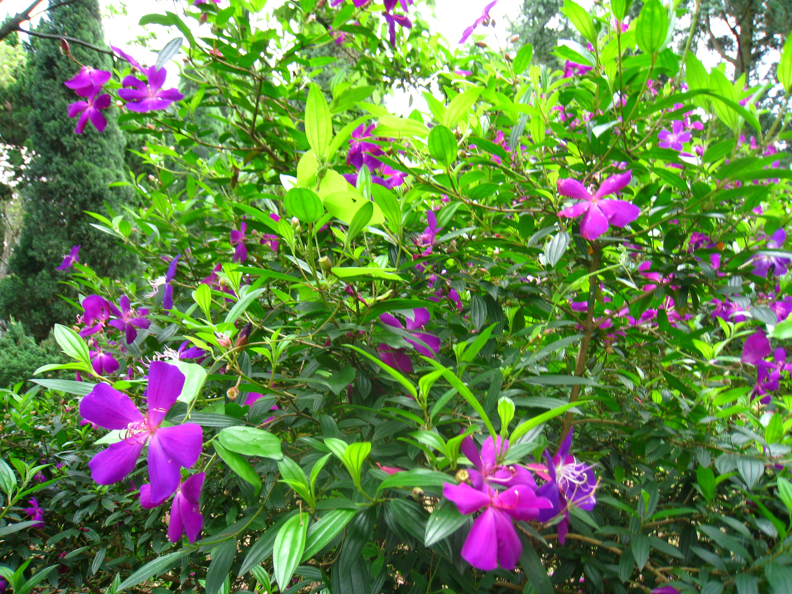 紫花綠葉